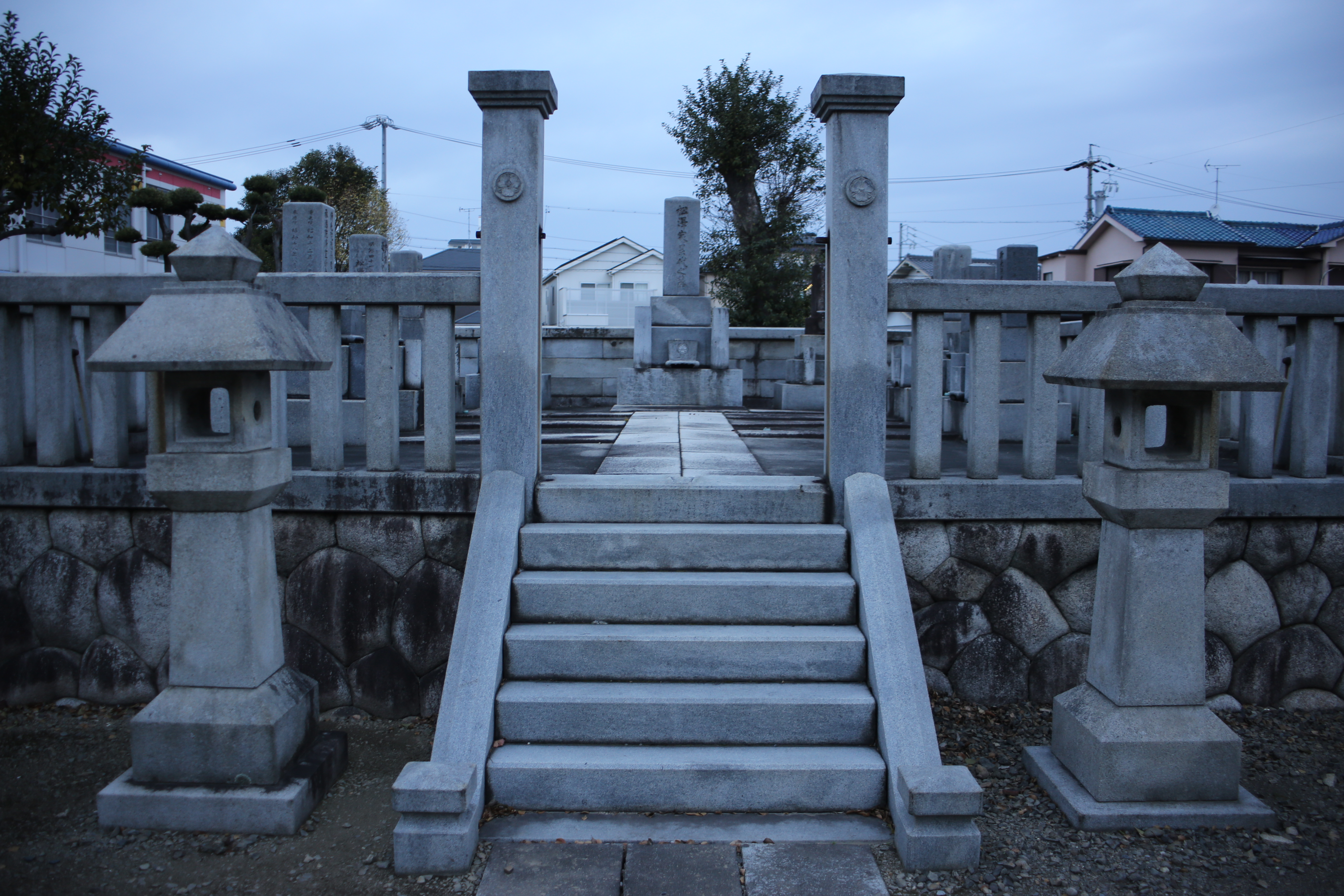 名古屋市西区中小田井の東雲寺墓地内松沢家の墓